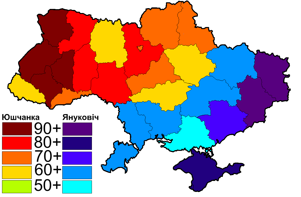 Результати по регіонах. (блоруською)